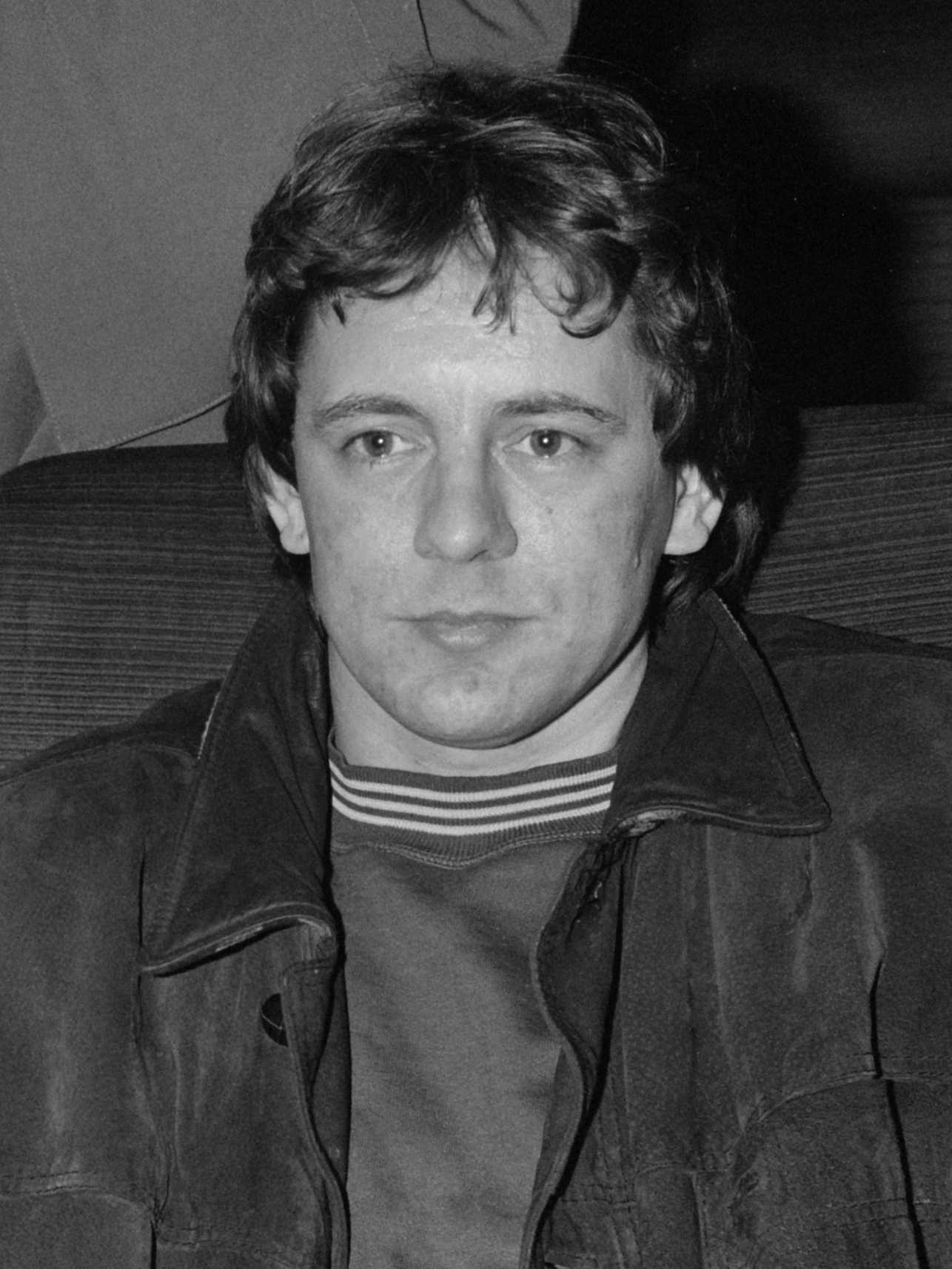 Perspremiere Nederlandse film "Amsterdamned"; regisseur Dick Maas 8 februari 1988